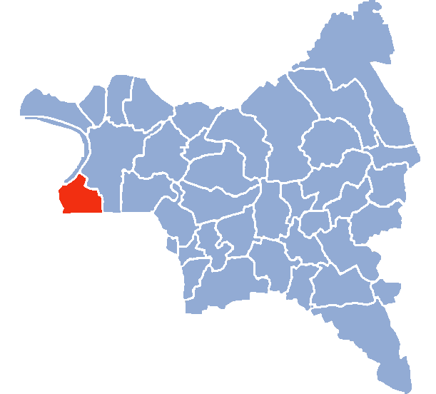 Auteur Hervé SUAUDEAU Licensing Catégorie:Cartes de Seine-saint-Denis